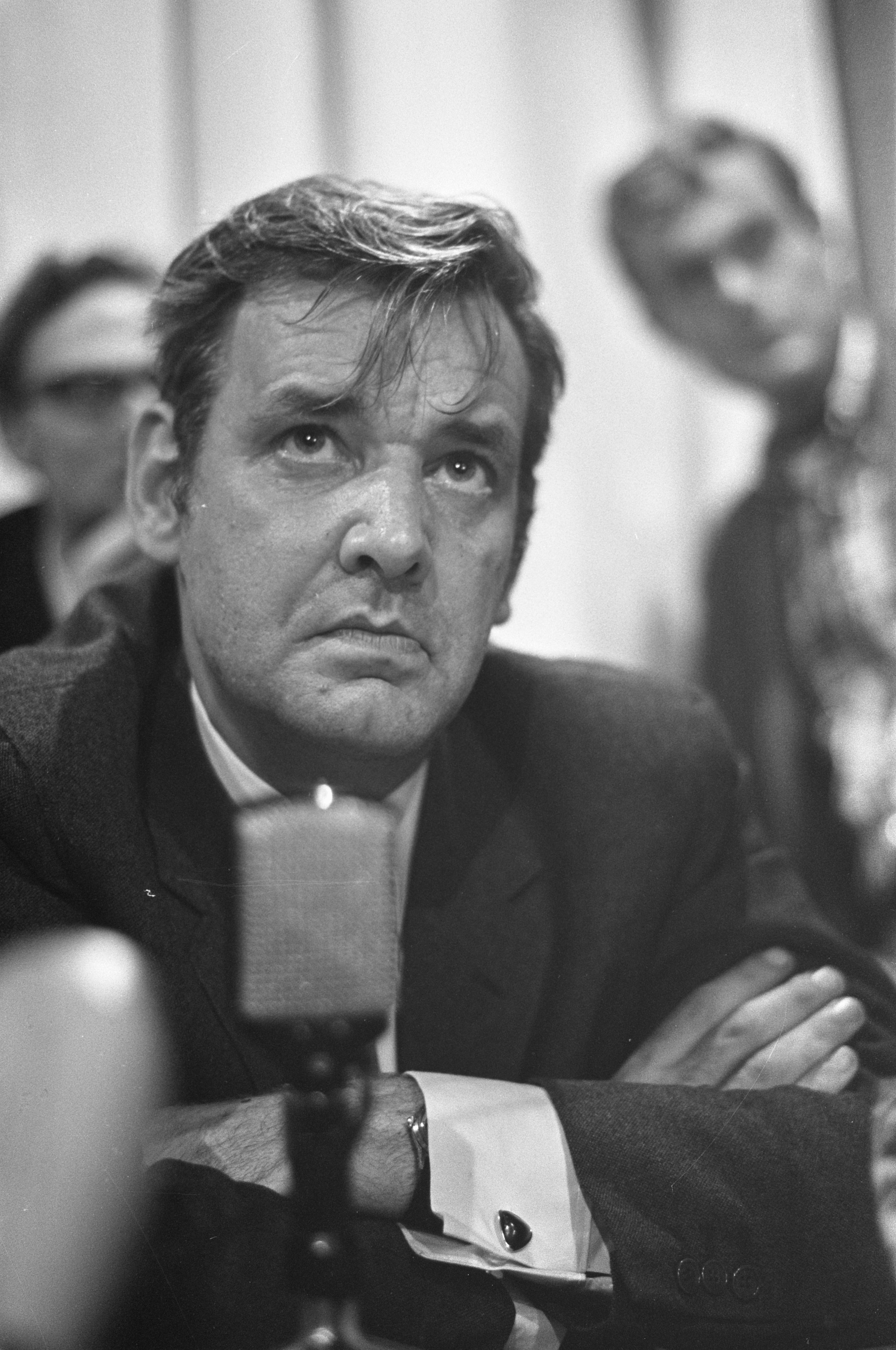 Collectie / Archief : Fotocollectie Anefo Reportage / Serie : [ onbekend ] Beschrijving : Discussie Persvrijheid in cafe St. Pieterspoort nr. 17 , 18: Frits van der Poel (kop) Datum : 11 oktober 1968 Trefwoorden : KOPPEN, cafes, discussies Persoonsnaam : St. Pieterspoort Fotograaf : Kroon, Ron / Anefo Auteursrechthebbende : Nationaal Archief Materiaalsoort : Negatief (zwart/wit) Nummer archiefinventaris : bekijk toegang 2.24.01.05 Bestanddeelnummer : 921-7571